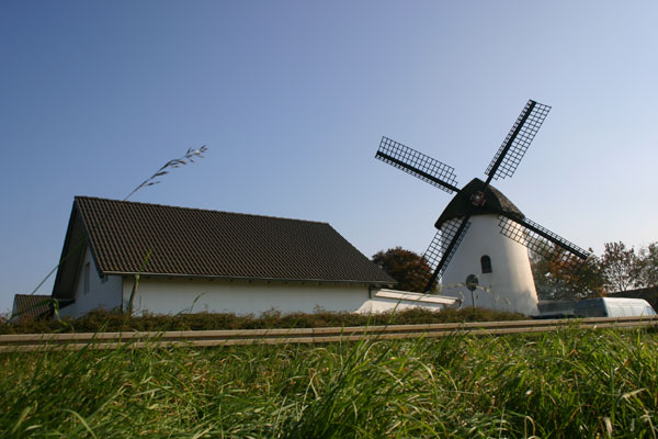 Die alte Mühle bei Elsdorf-Esch